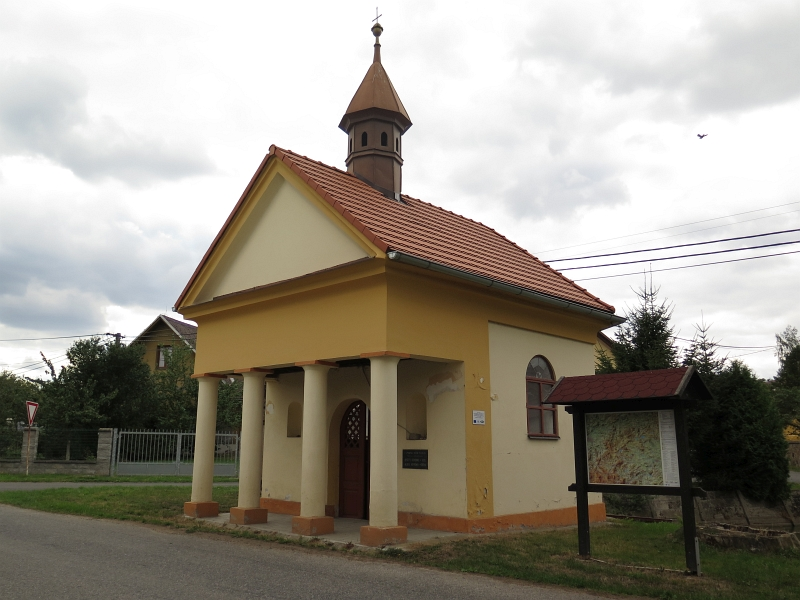 Kaple svatého Jana Nepomuckého, náves, Slavošovice (Bolešiny).